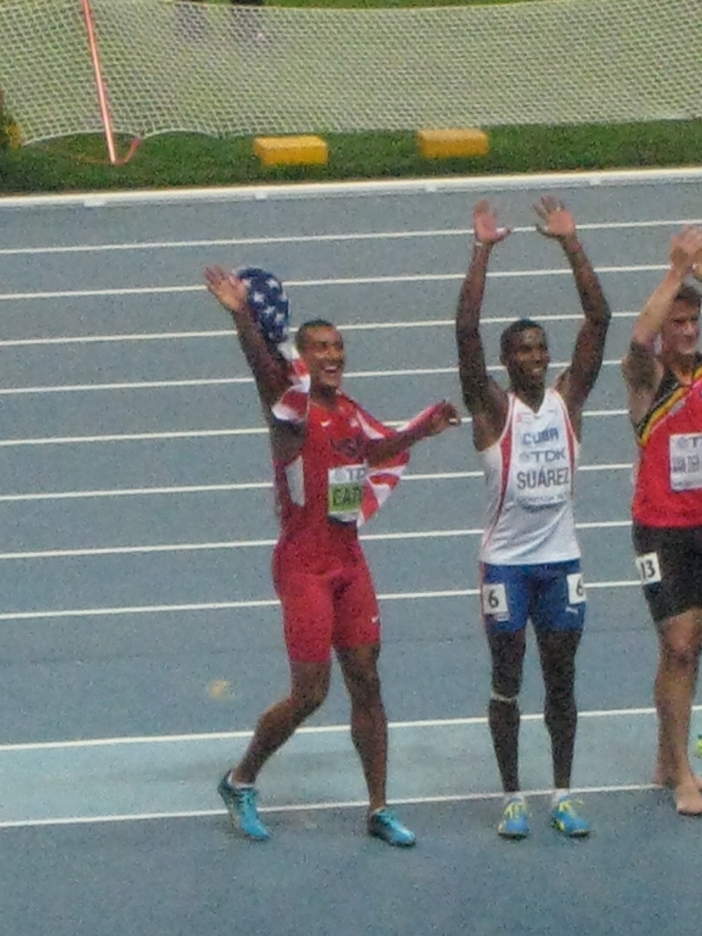 Эштон Итон и Леонель Суарес на чемпионате мира 2013